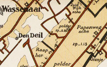 Zuidwijkse Polder